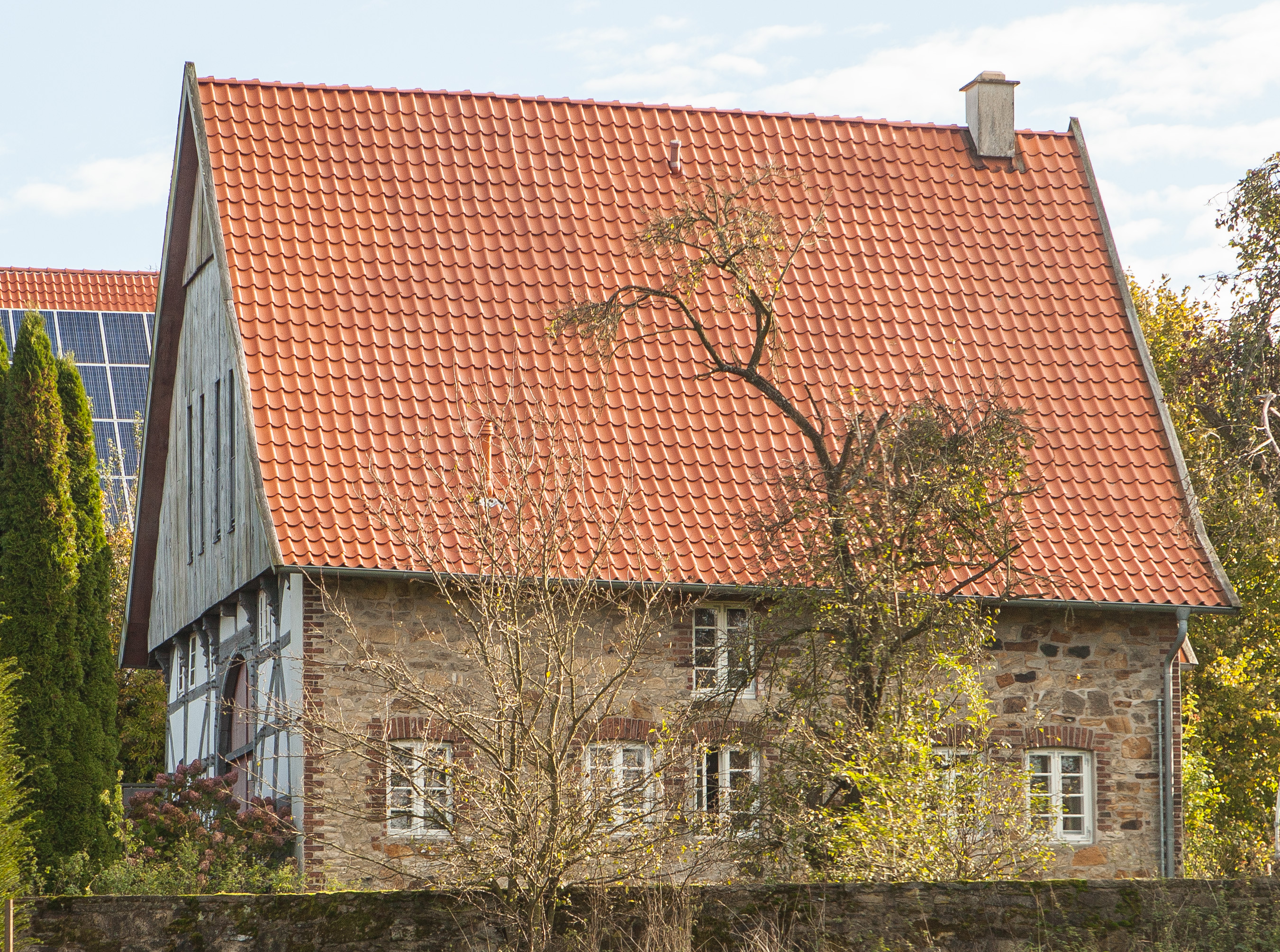 Wüsten (Bad Salzuflen), Bieberstr. 1a This is a photograph of an architectural monument.